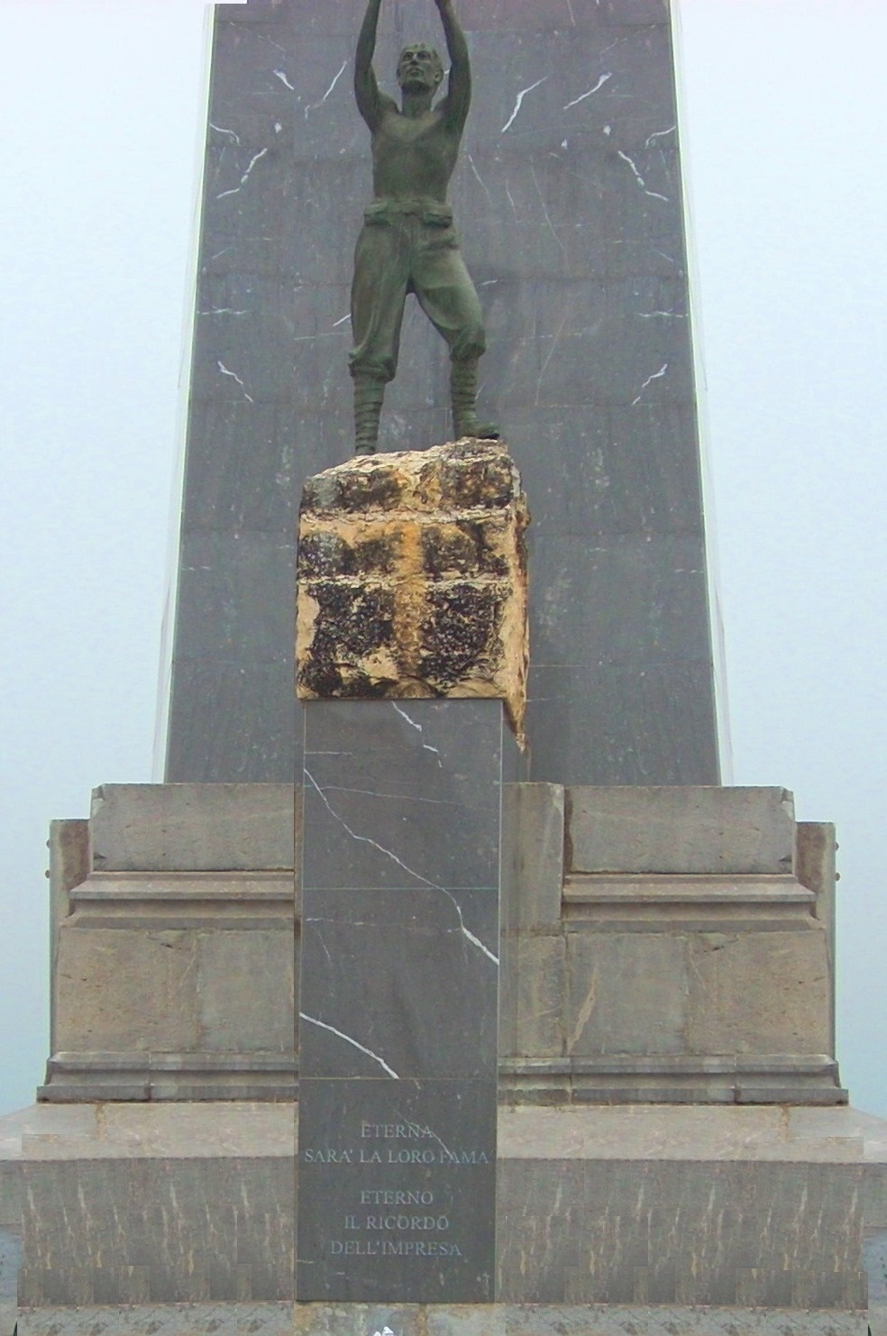 Monumento ai caduti (città di San Cataldo, provincia Caltanissetta)(3).jpg